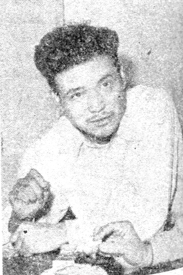 世界映画社『日本映画』第5号（1954）より織本順吉